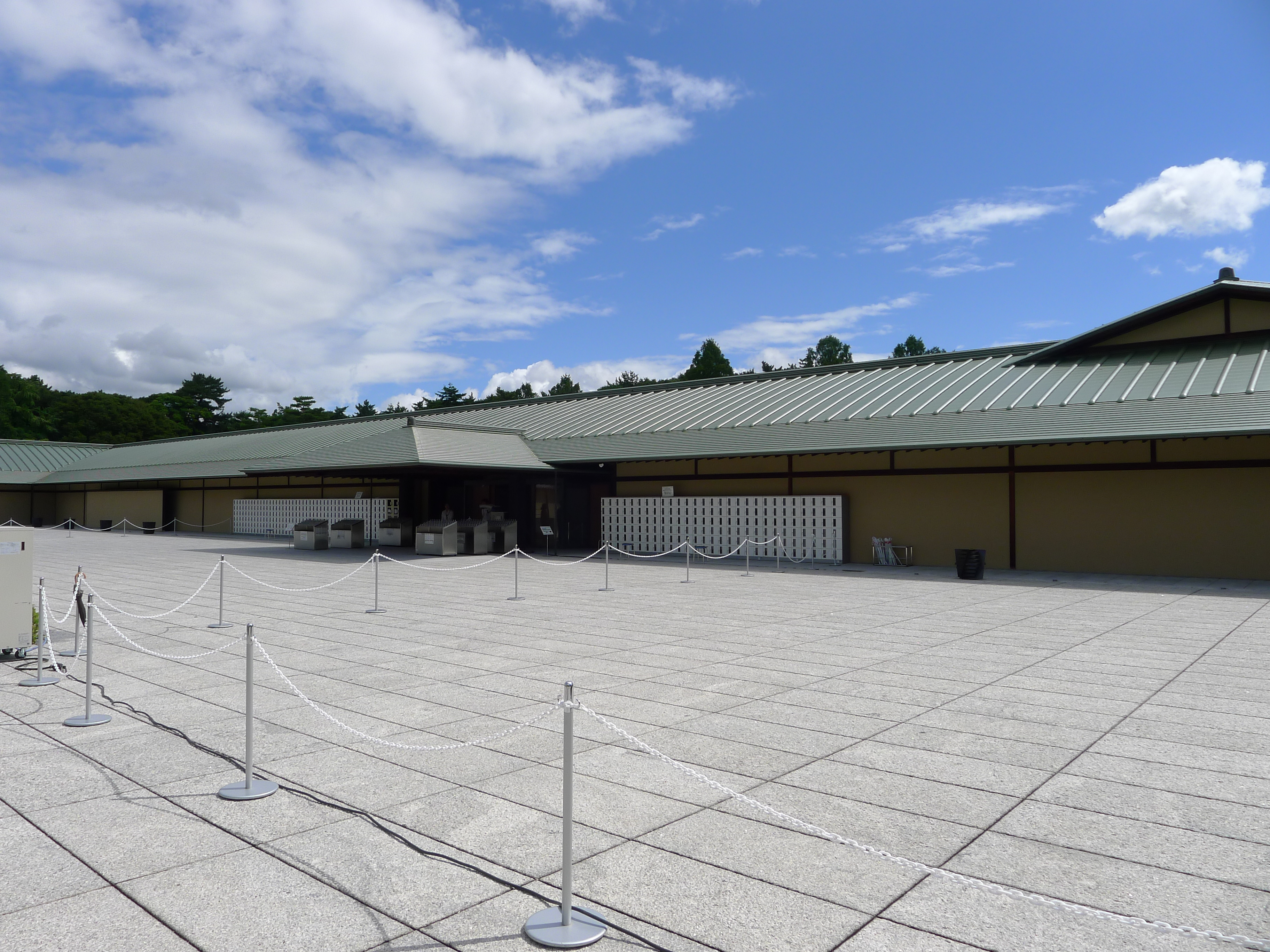 京都迎賓館：正面玄関・車寄せ 京都御苑内にあり京都御所と並ぶことから入母屋造りの外観